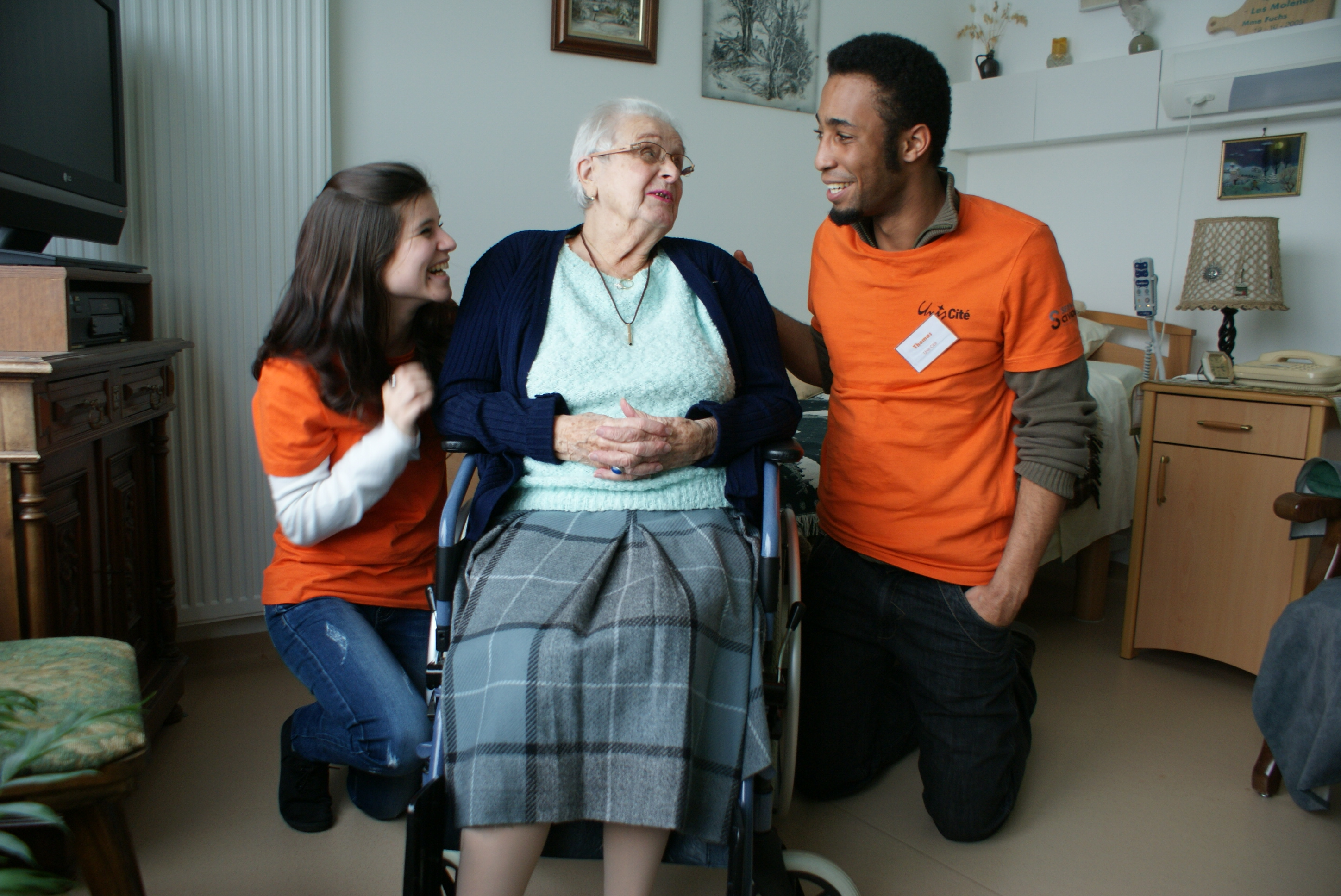 Mission de Service Civique à Unis-Cité Personnes âgées